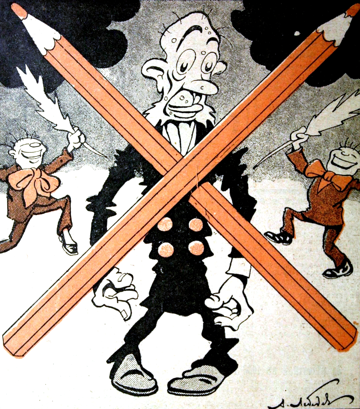 Карикатура в журнале "Стрекоза" №15. Март, 1917. Подпись под картинкой: "Над журнальным страшилищем, над цензором окаянным - поставлен крест. Сотрудники "Стрекозы" ликуют". Рис. А. Лебедева